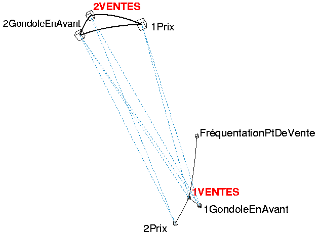 Iconographie des corrélations ventes marketing